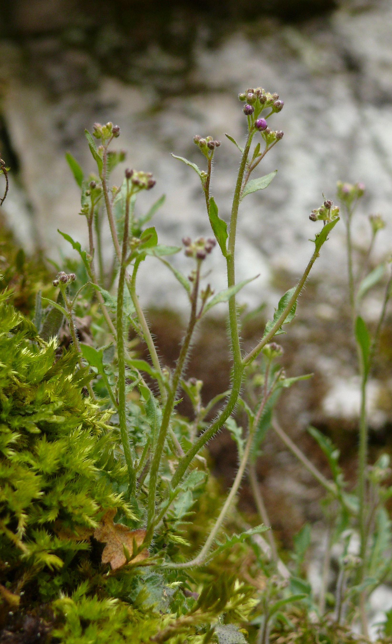 Arabidopsis arenosa subsp. borbasii, Schwäbisch Alb, Deutschland